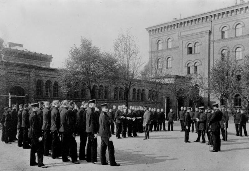 Mittagsappell Nach beendetem Unterrichte, vereinigt sich die Kadettenkompagnie zum Mittagsappell, bei dem unter Anwesenheit der vier Erzieher vom Kompagniechef alle internen Angelegenheiten der Kompagnie besprochen, die eingegangen Briefe ausgeteilt und der Absender kontrolliert, die Befehle des Bataillons- und des Anstaltskommandos verlesen und Strafen für begangene Sünden im Unterricht oder Verstöße gegen die Anstaltsordnung verhängt werden. 9./HKA